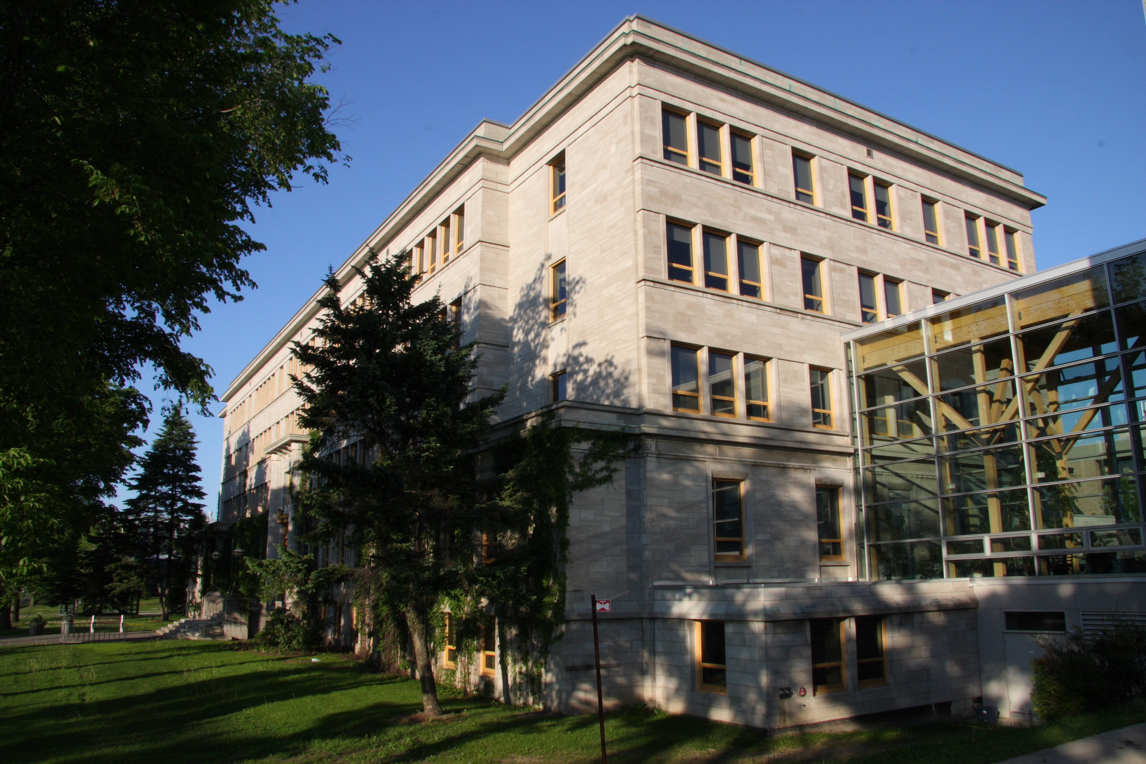 Pavillon Abitibi-Price de l'Université Laval.